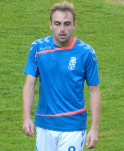 Héctor Font en la presentación del Real Oviedo 2015-16